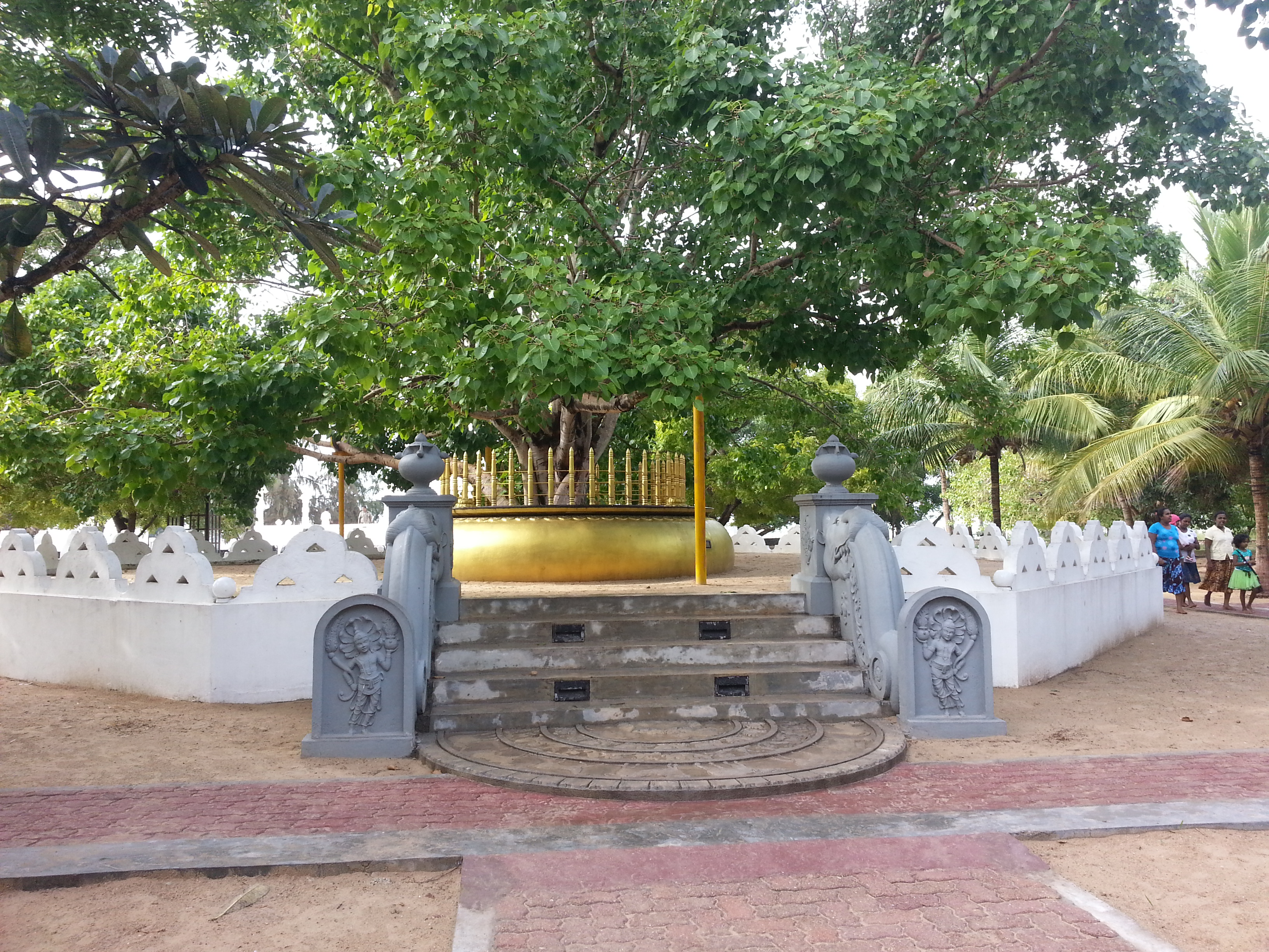 வெள்ளரசுமரம்